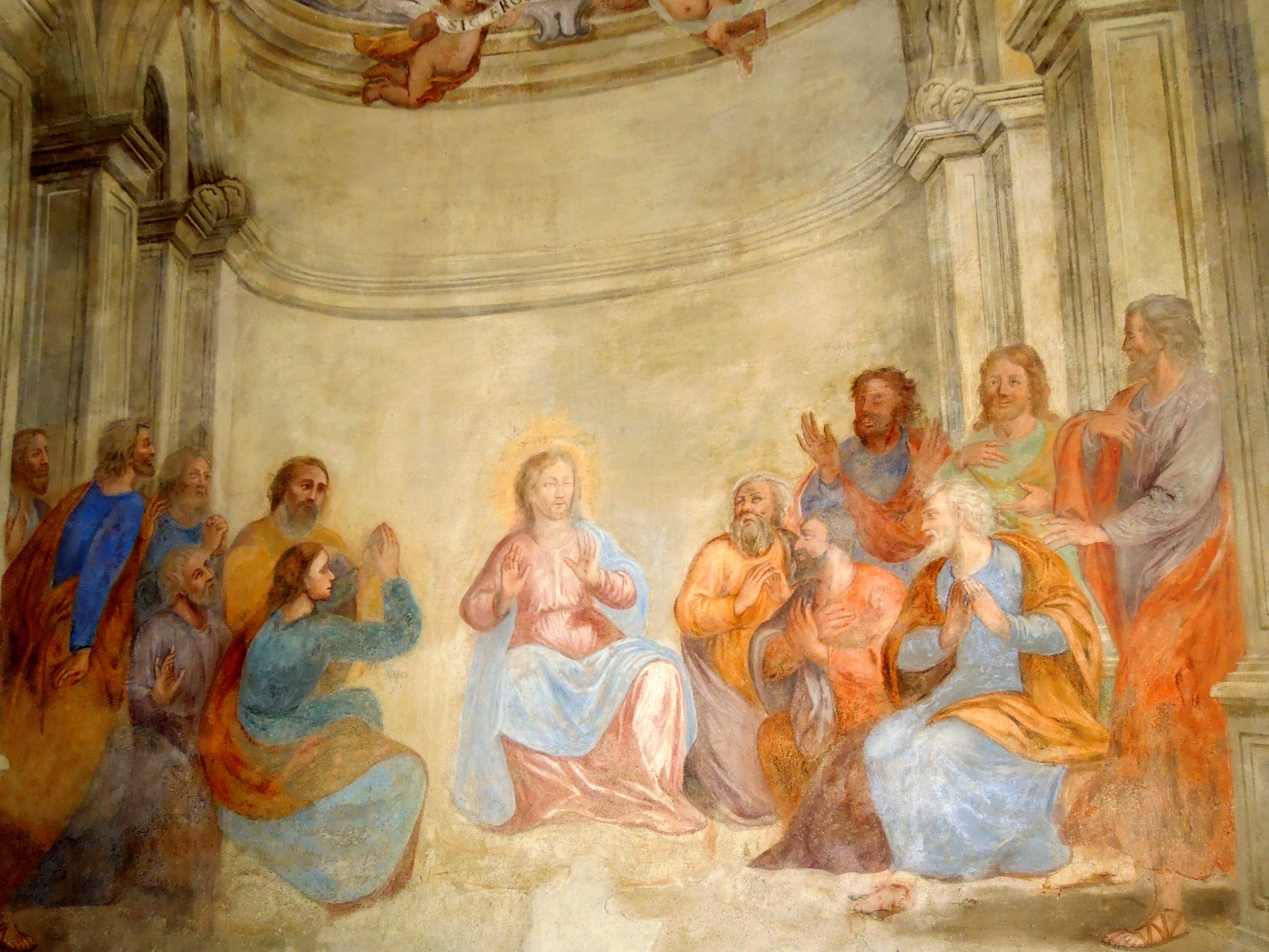 Affresco del XVII nella Confraternita della Santissima Trinita a Cortemilia / Cuneo